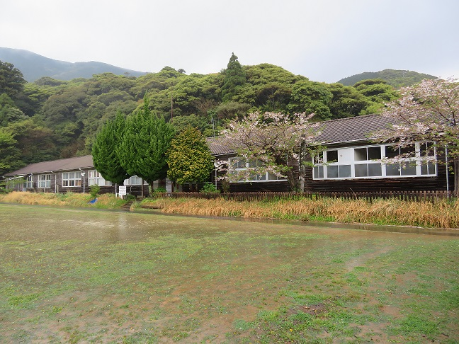 旧対馬市立久田小学校内院分校